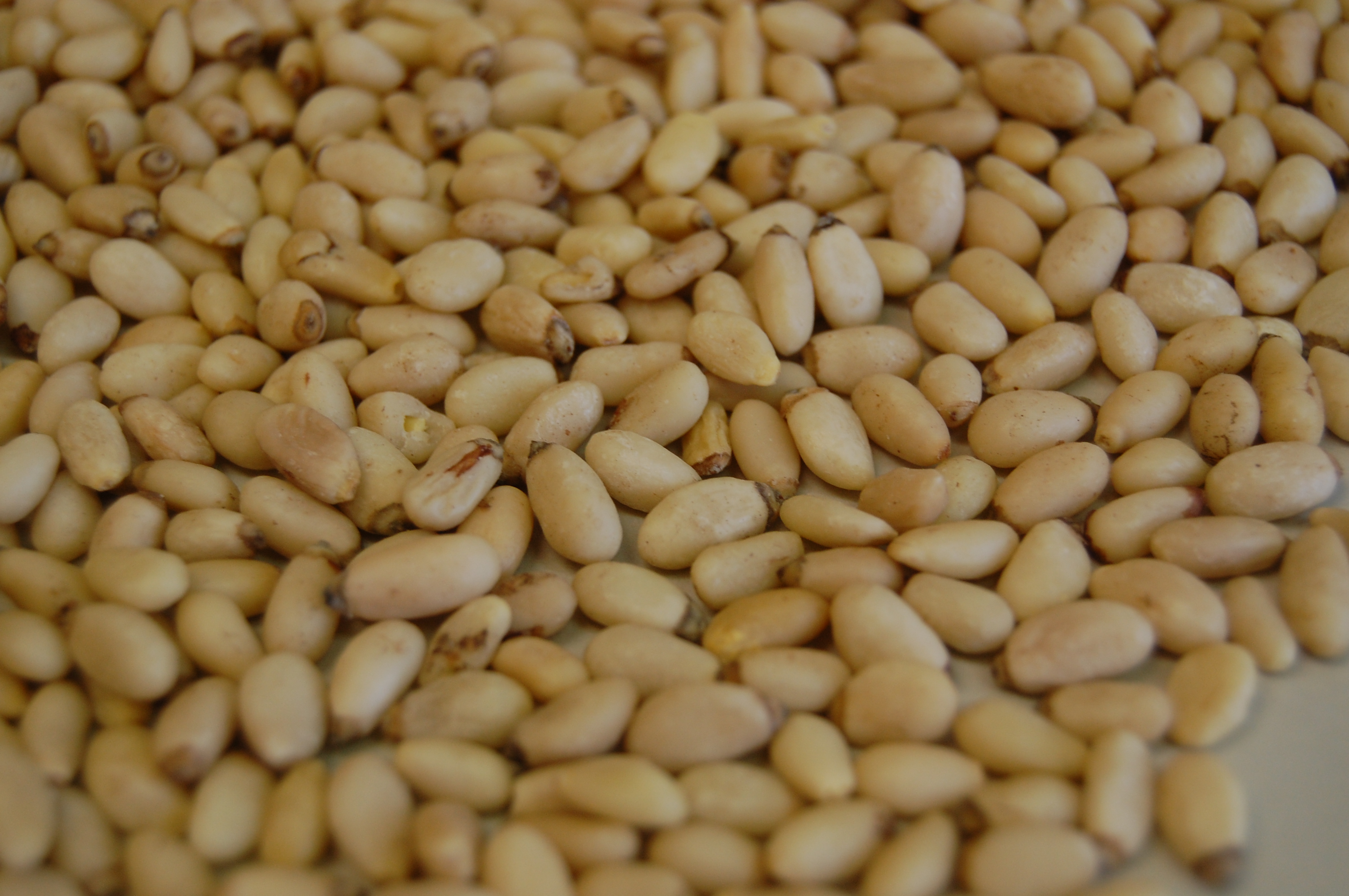 Shelled pine nuts Pinus armandii